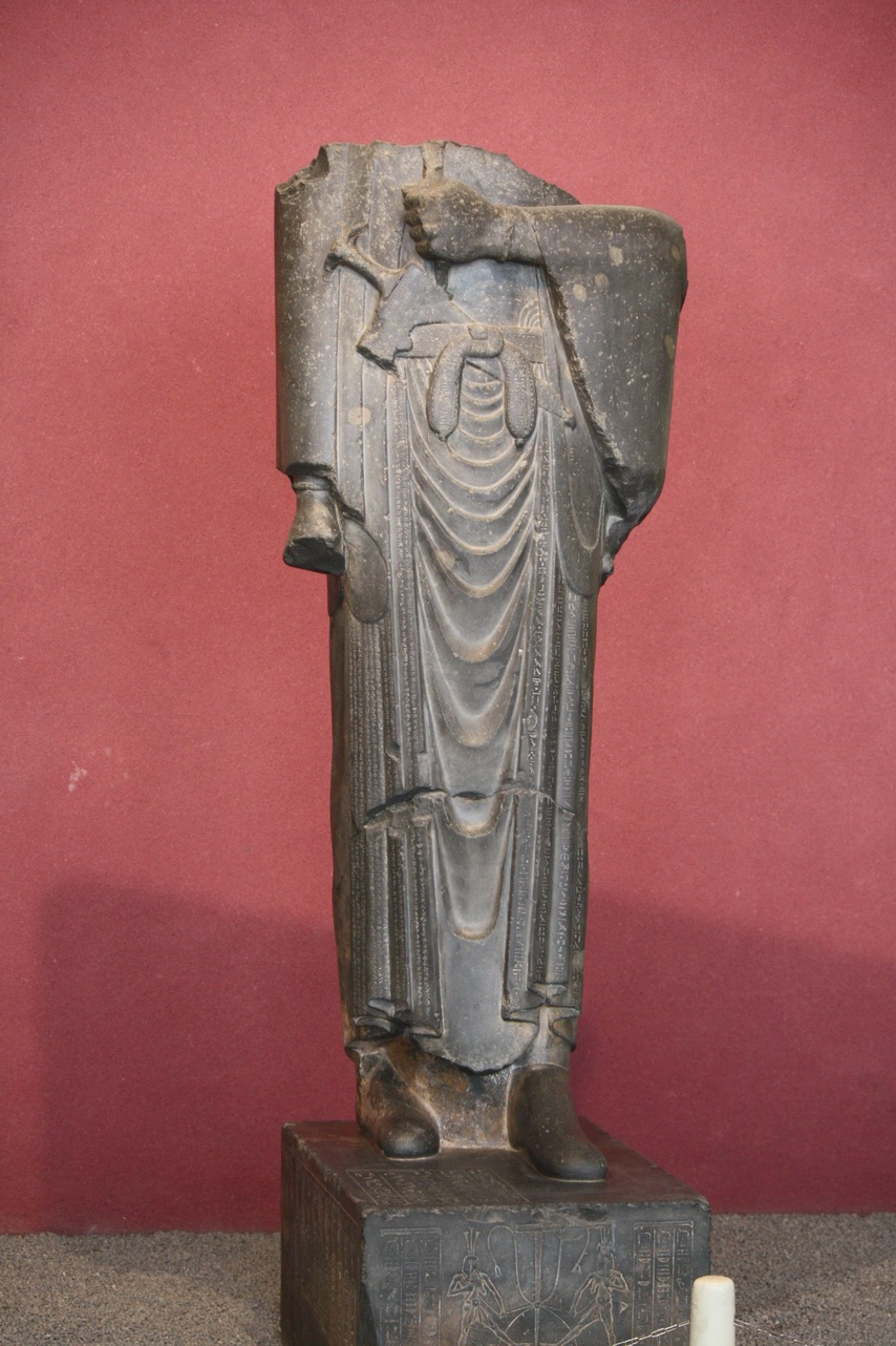 این تصویر در تاریخ ۴/۹/۲۰۰۸، از تندیس داریوش اول، موجود در موزه ملی ایران، توسط دوربین کانون ۴۵۰دی گرفته شده است.